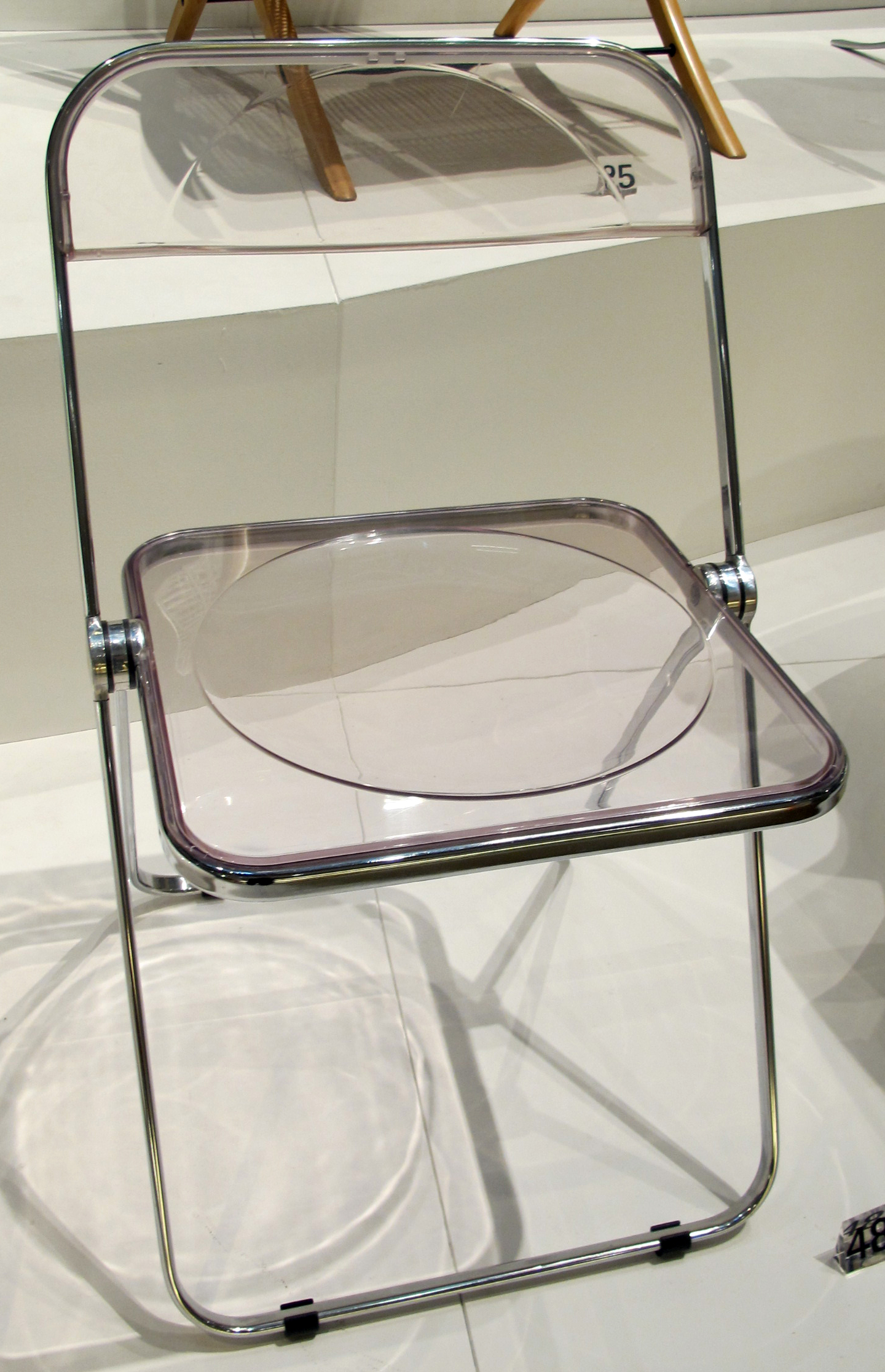 Giancarlo pretti, sedia pieghevole, 1970